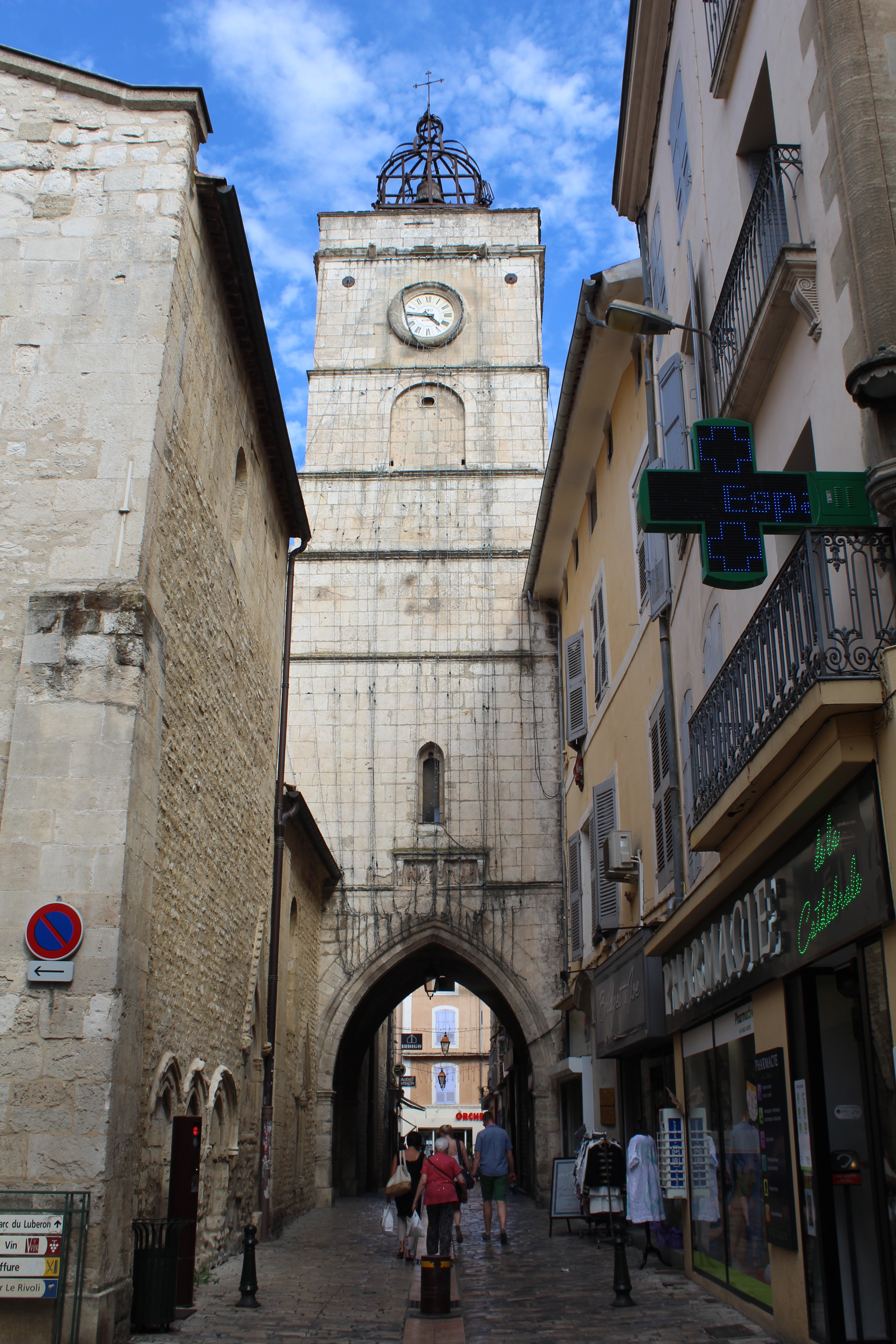 Tour de l'Horloge, Apt.